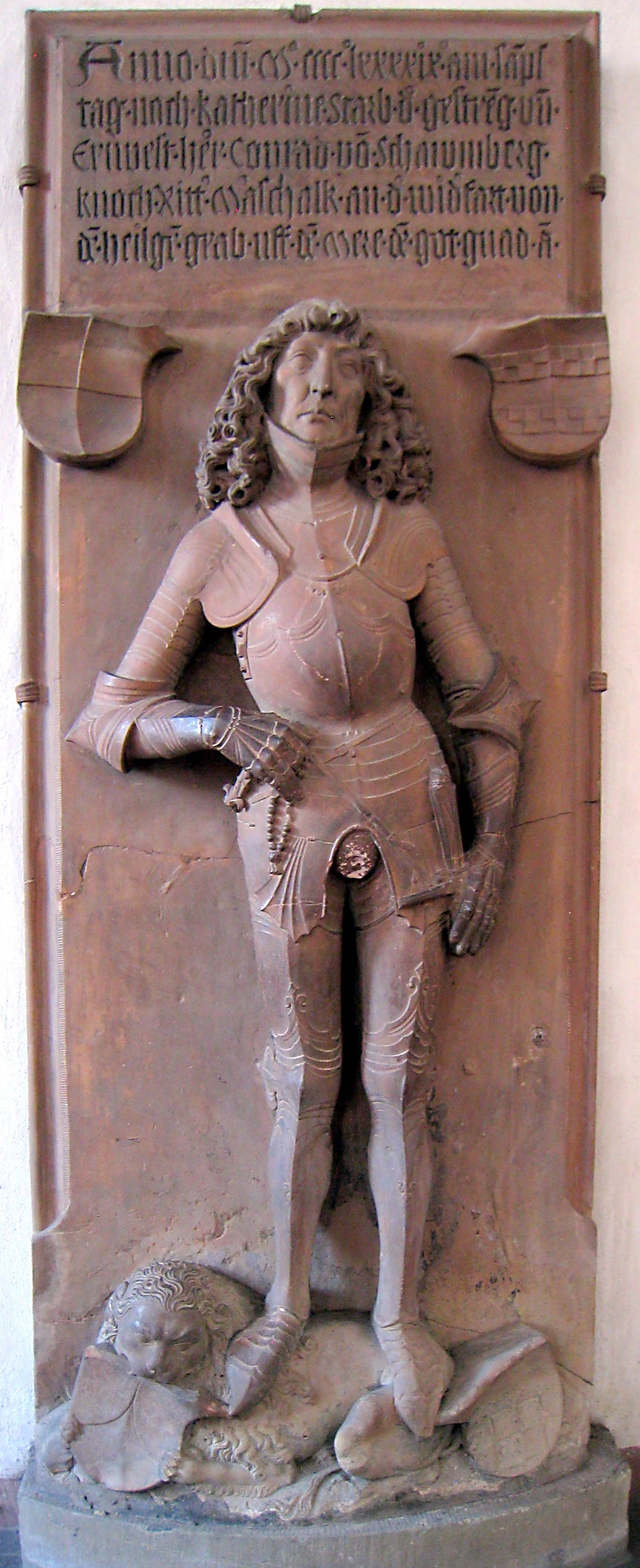 Memorial to Konrad von Schaumberg (d. 1499) by Tilman Riemenschneider, in Marienkapelle, Würzburg, Germany.